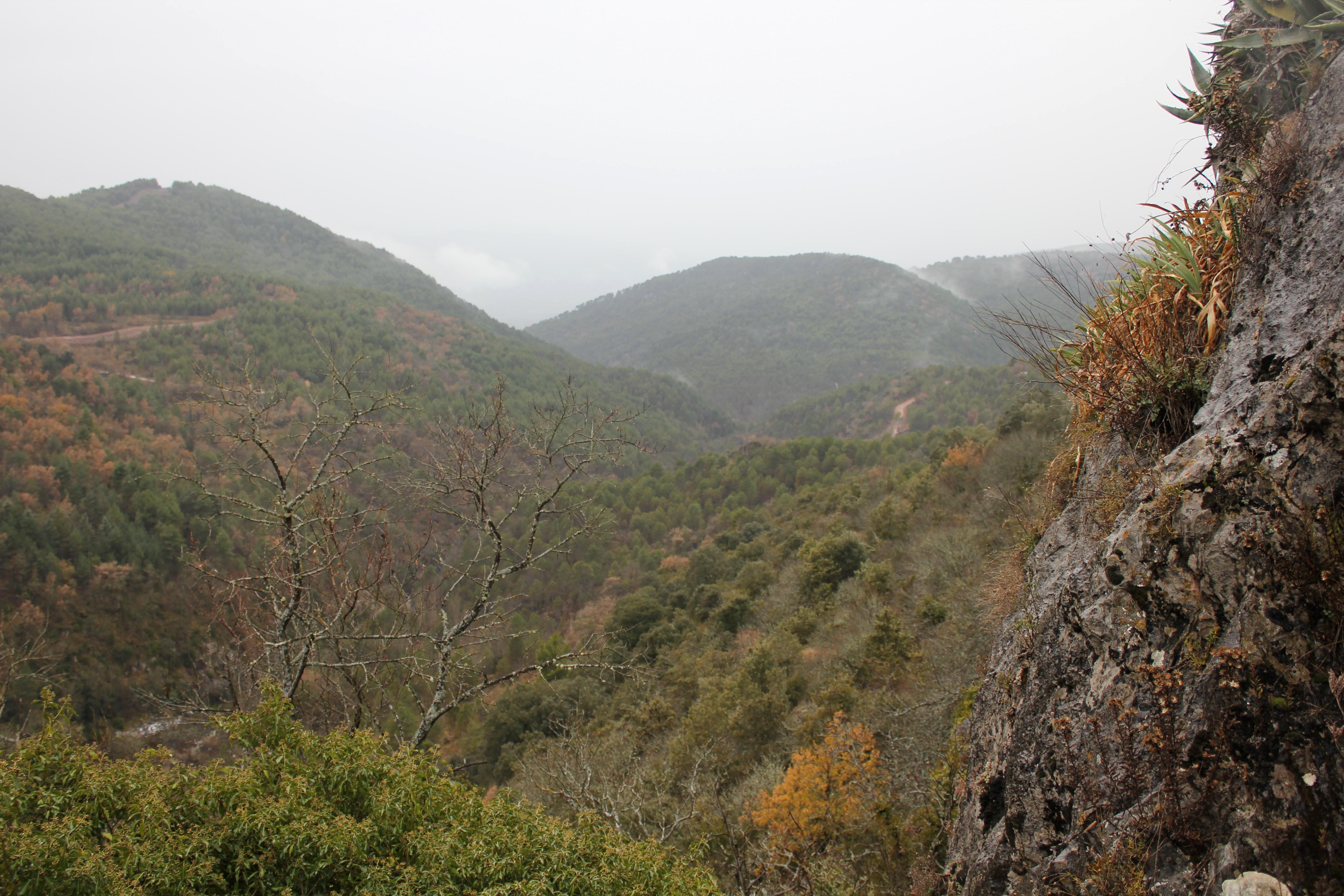 Aragonés: O barranco d'o Salinar dende Trillo.